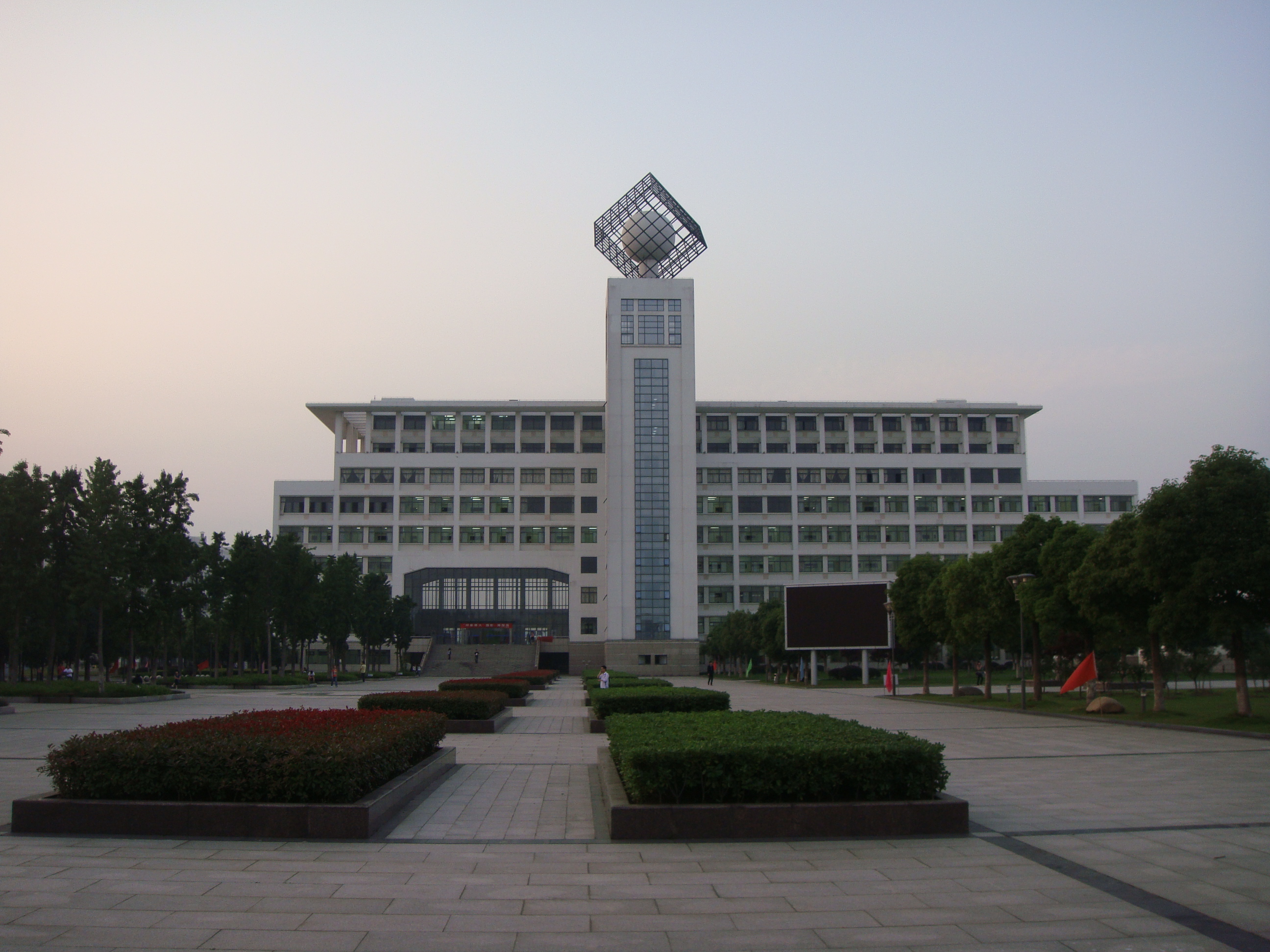 常州大学教学楼